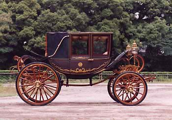 儀装馬車2号（幌付）